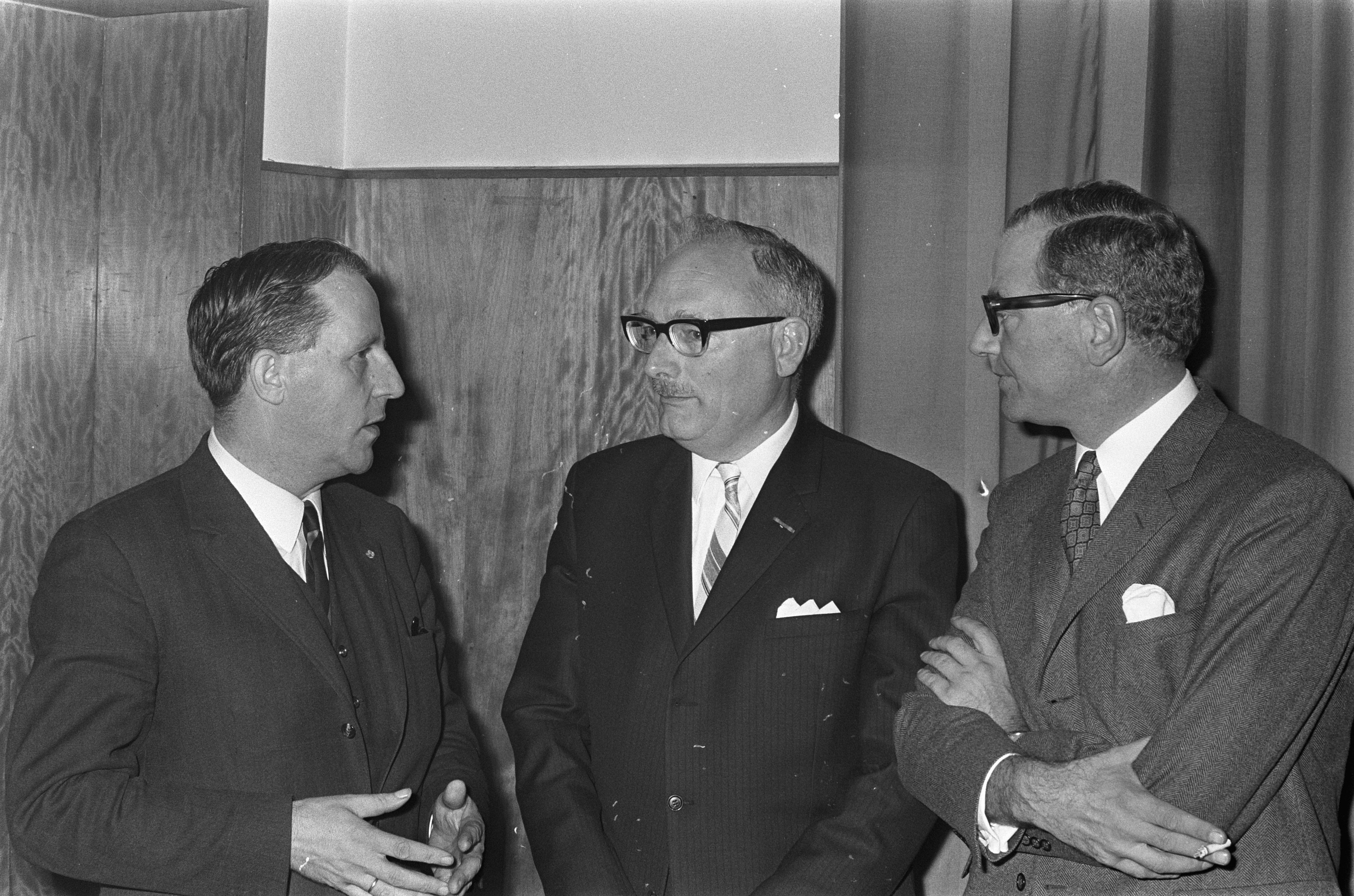 Collectie / Archief : Fotocollectie Anefo Reportage / Serie : [ onbekend ] Beschrijving : Vergadering Unieraad CHU in het gebouw van K. en W. Utrecht. Veerman, Van Hulst, Van der Stee Datum : 15 november 1969 Locatie : Utrecht Trefwoorden : Vergaderingen, gebouwen Instellingsnaam : CHU Fotograaf : Evers, Joost / Anefo Auteursrechthebbende : Nationaal Archief Materiaalsoort : Negatief (zwart/wit) Nummer archiefinventaris : bekijk toegang 2.24.01.05 Bestanddeelnummer : 922-9743